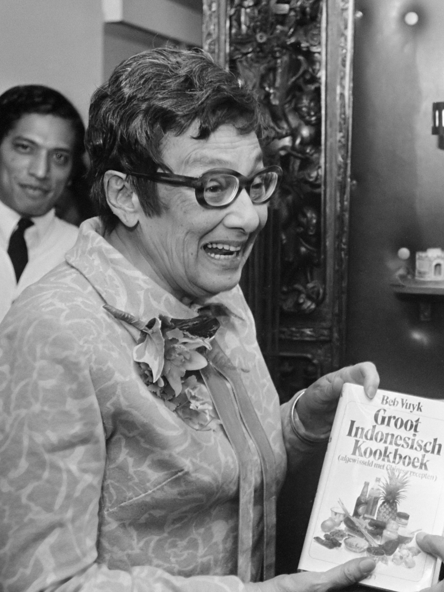 Bep Vuyk geeft exemplaar van haar Groot Indonesisch Kookboek aan waarnemend ambassadeur va Indonesie, Sujatmo Martosuhardjo 9 oktober 1973